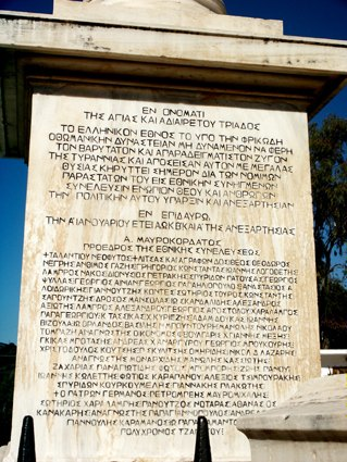 Nea Epidavros. Denkmal für die erste griechische Nationalversammlung vom 20.12.1821. Anfang der Unabhängigkeitserklrärung.